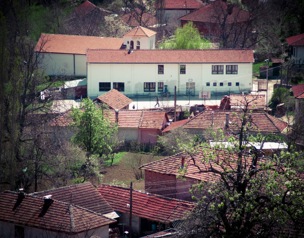 Училището в селото Побоже, Република Македония.